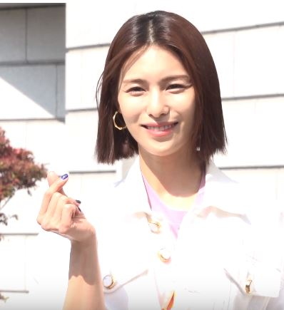 KBS 2TV ‘해피투게더 시즌4’ 녹화가 11일 오전 서울 영등포구 여의도동 KBS 별관에서 진행됐다.